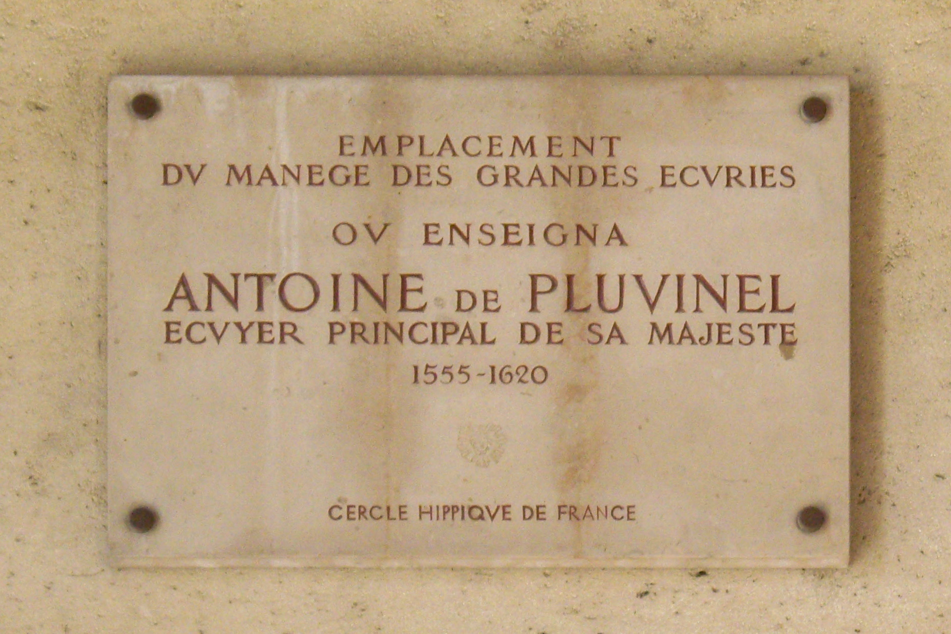 Plaque apposée au n° 192 de la rue de Rivoli, Paris 1er.« Emplacement du manège des Grandes Écuries où enseigna Antoine de Pluvinel, écuyer principal de Sa Majesté, 1550-1620.Cercle hippique de France »